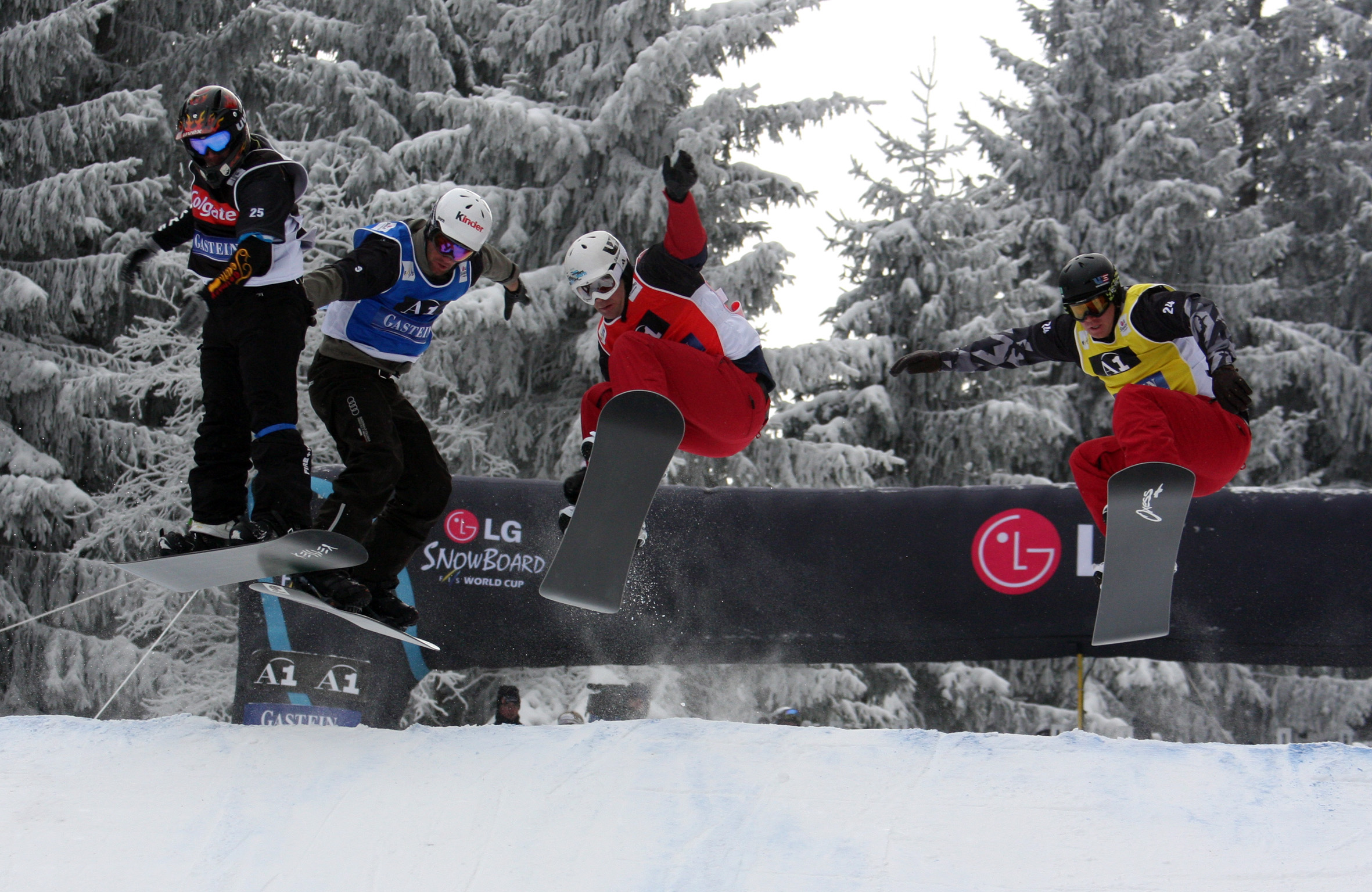 Bad Gastein_SBX_Heat_2_Men_Maximilian_Stark_GER_Alberto_Schiavon_ITA_Nick_Baumgartner_USA_Ross_Powers_USA